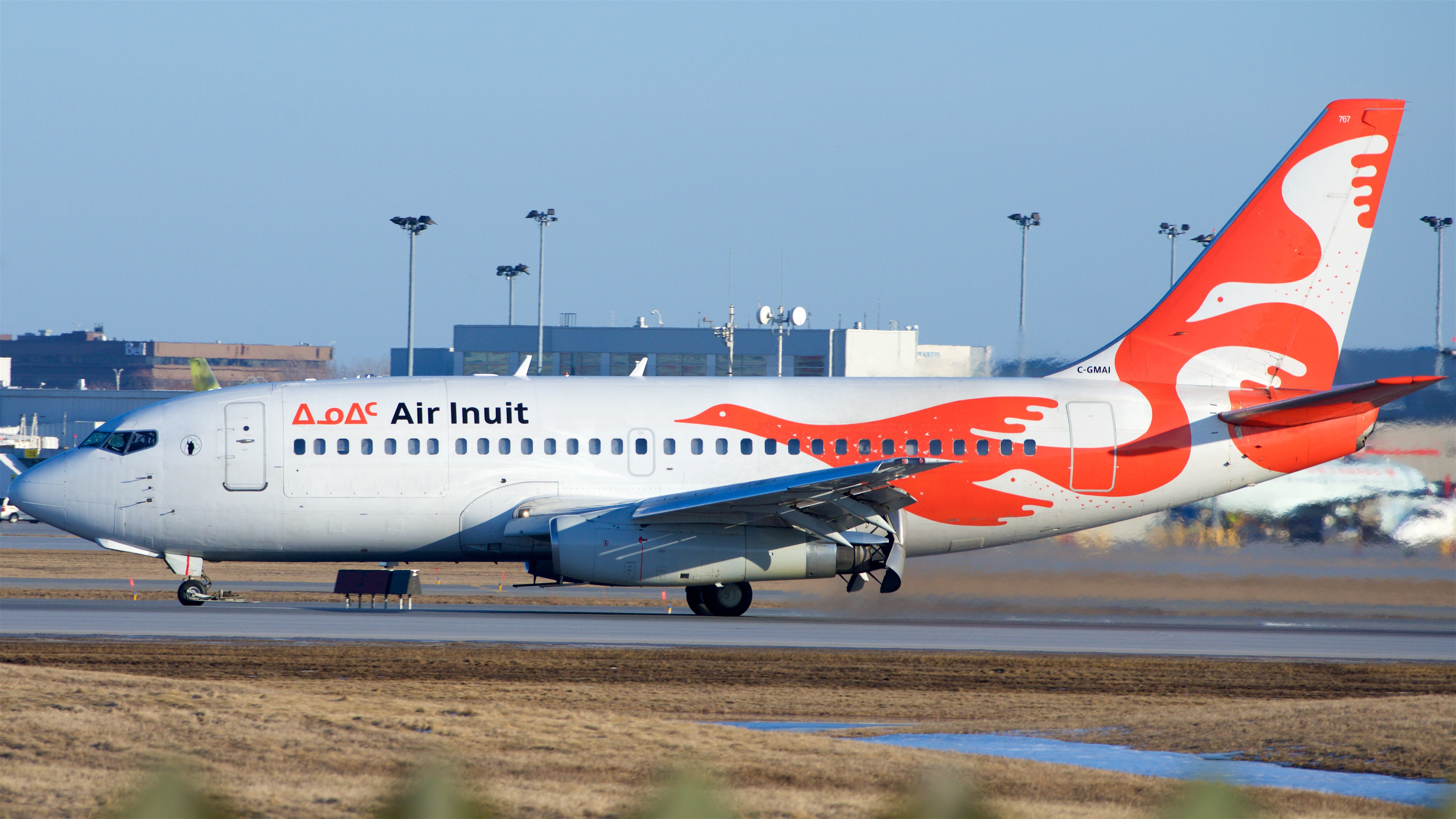 Stunning livery. YUL.